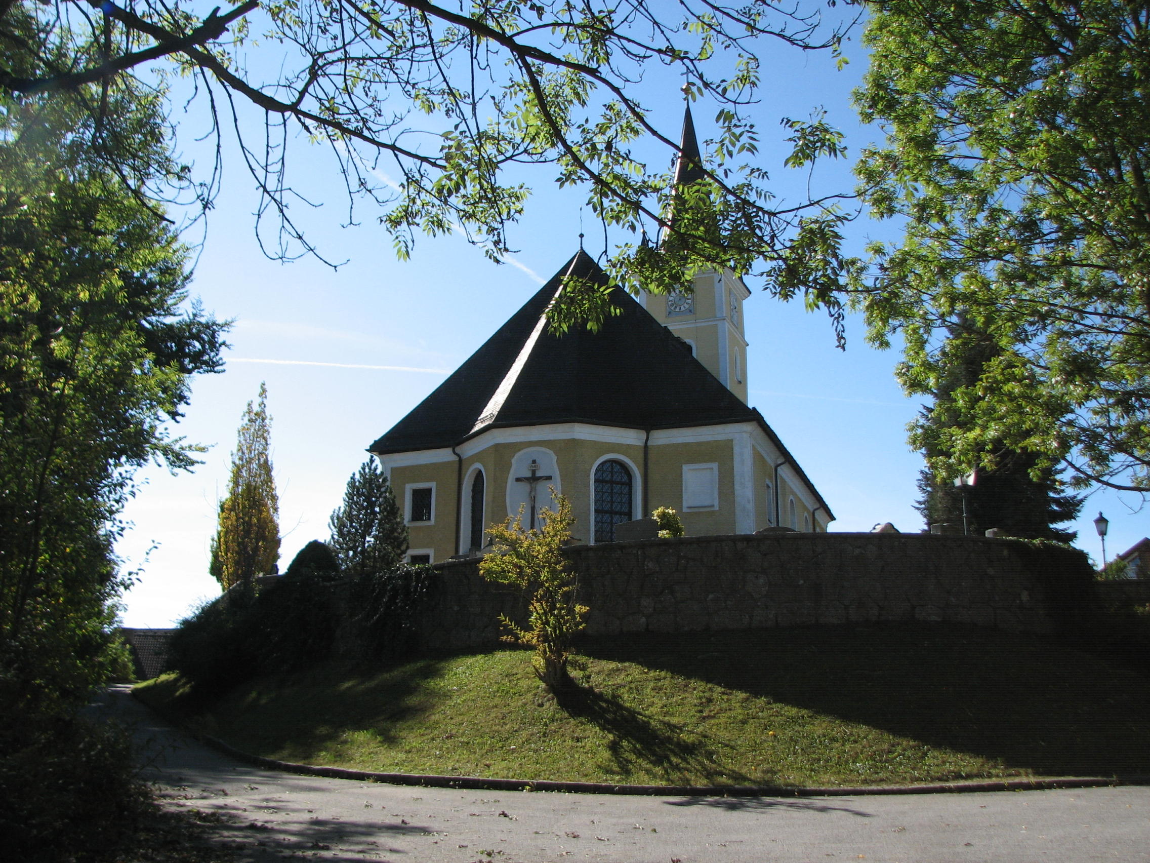 Kath. Pfarrkirche hl. Vitus